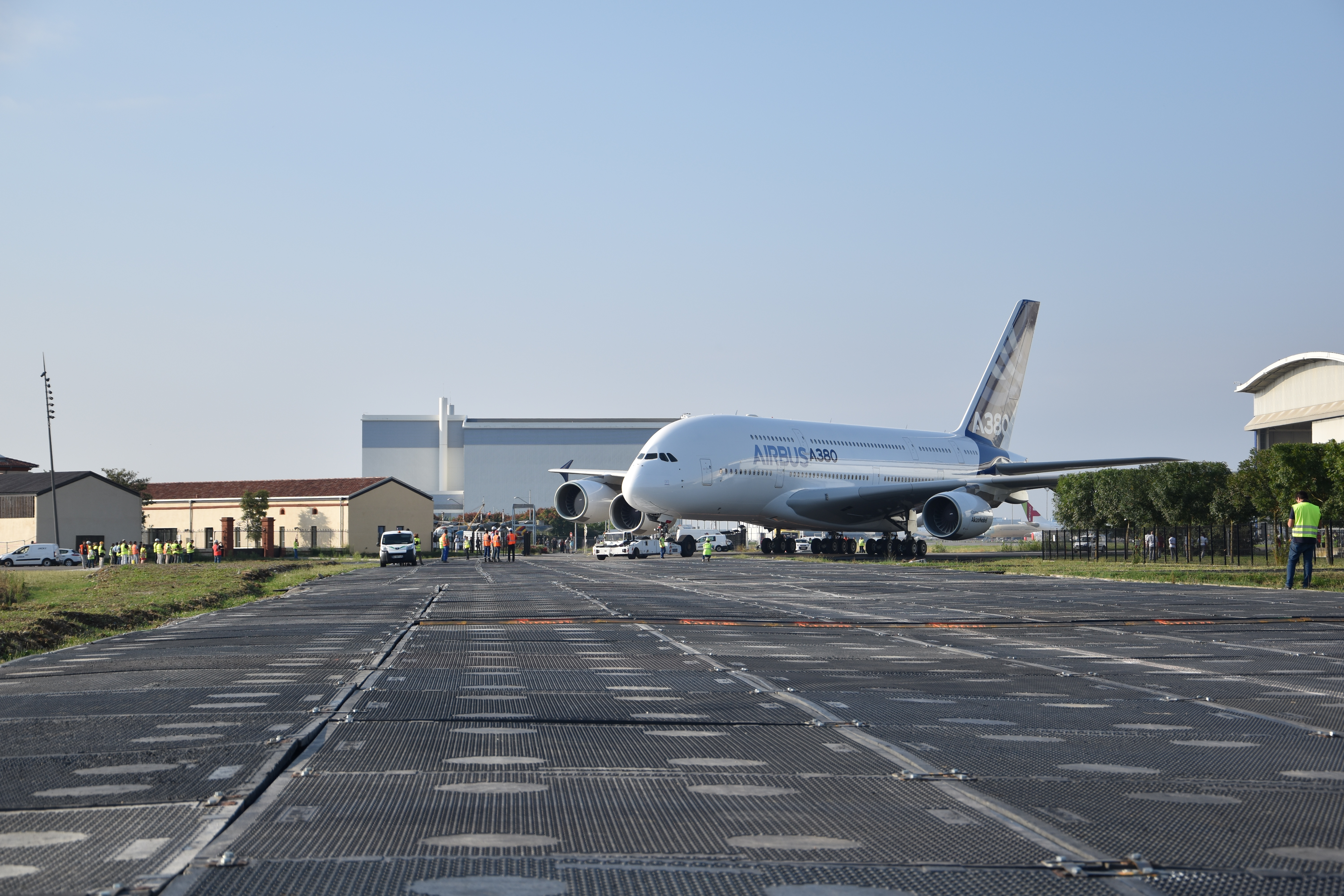 Transfert sur le Tarmac Nord du musée Aeroscopia de l'A380-800 MSN002 F-WXXL le 29 aout 2019